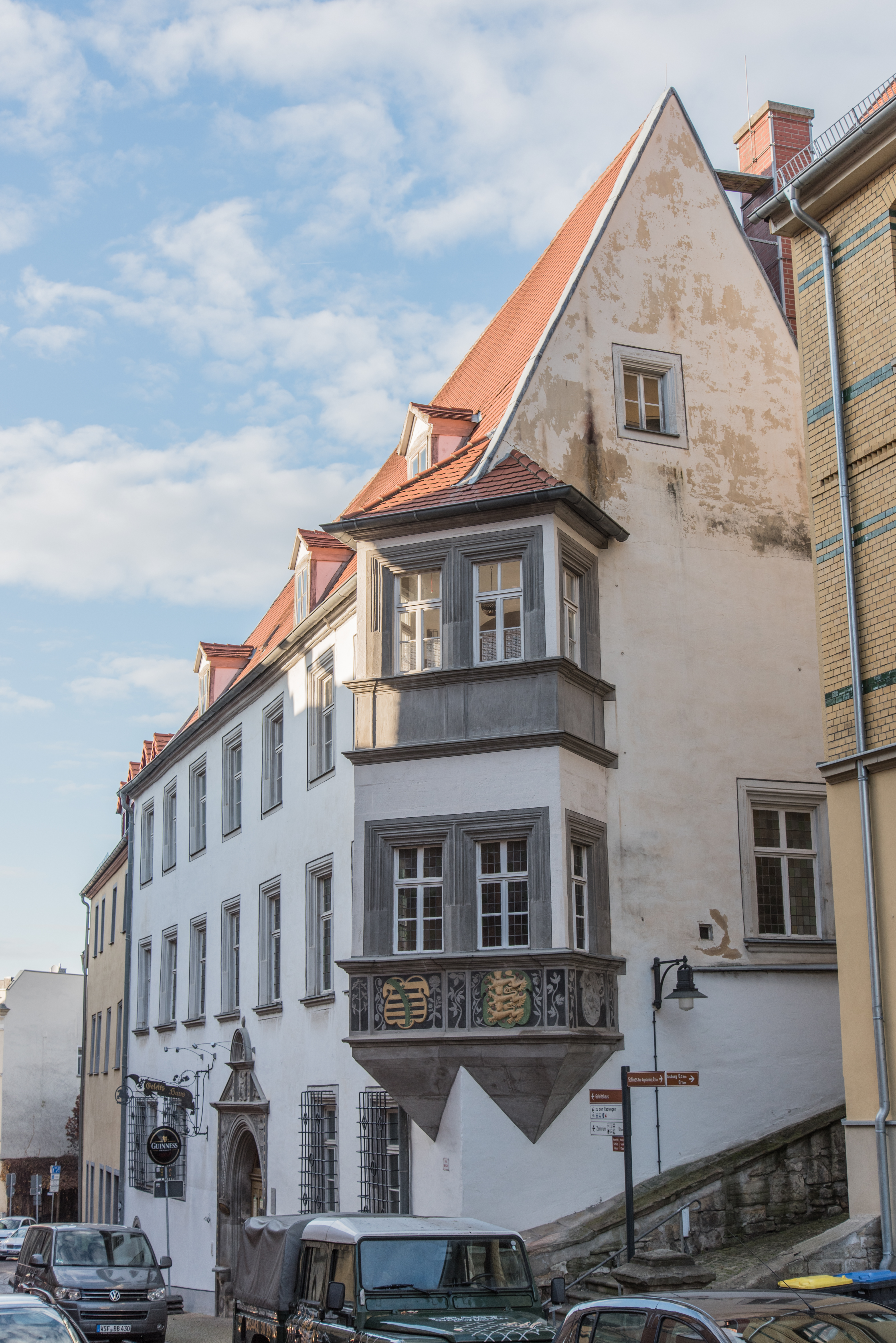 Weißenfels, Große Burgstraße 22